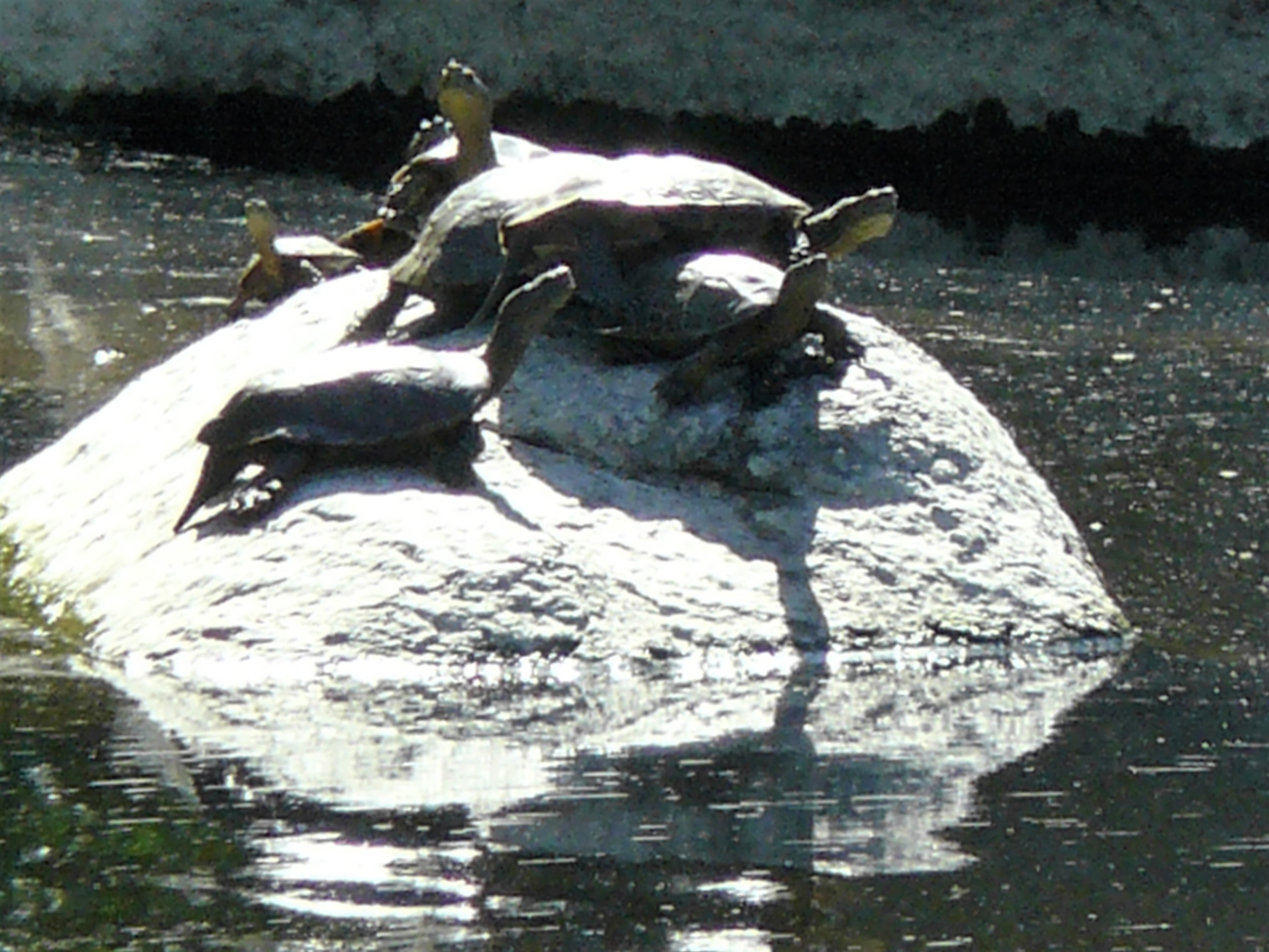 Sierra de San Vicente y valles del Tiétar y Alberche This is a photography of a Site of Community Importance in Spain with the ID: ES4250001. Natura2000 entry, EEA entry